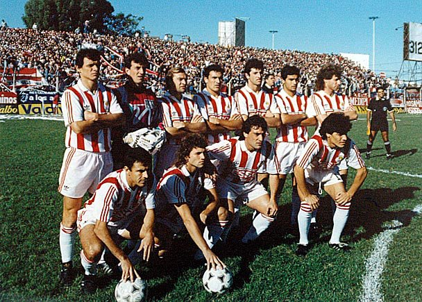 La formación de Estudiantes de La Plata, en un partido frente a Platense, disputado el domingo 17 de abril de 1994, por la 4ta. fecha del Torneo Clausura. Detrás, la tribuna visitante con los simpatizantes de Estudiantes. Arriba: Daniel Pighín, Marcelo Yorno, Alberto Boggio, Néstor Lorenzo, Diego Capria, Gonzalo Gaitán y Edgardo Prátola; abajo: Gabriel González, Rubén Capria, Nelson Cabrera y Rubén Paz.